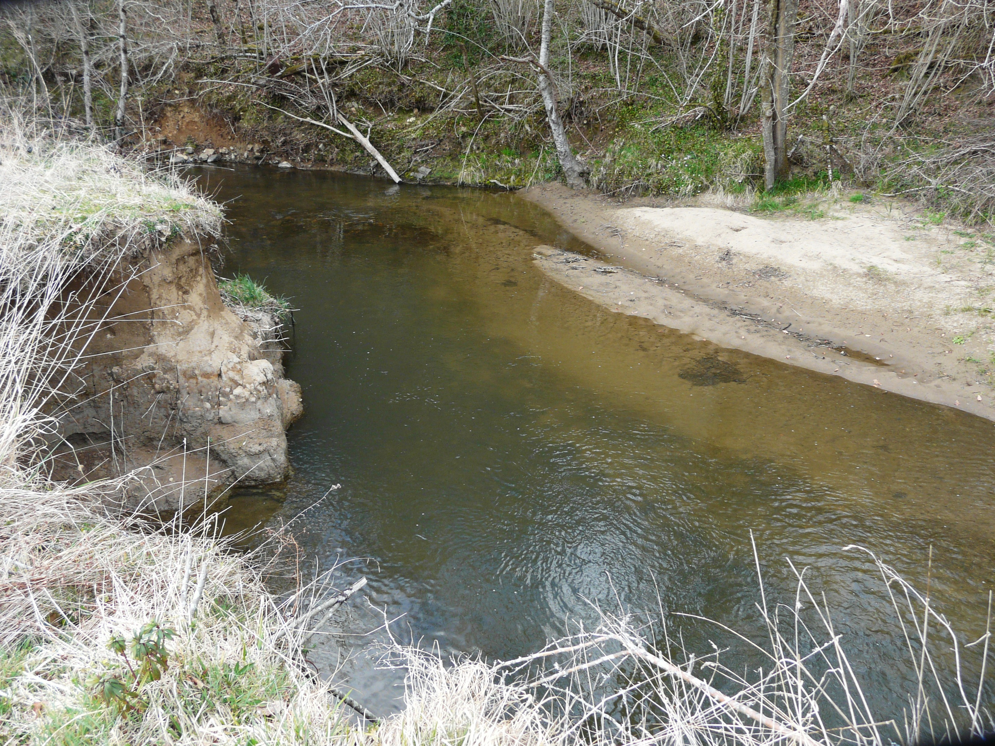 Ruisseau le Lavaud en amont de Gengireau, en limite de Sarrazac et Saint-Sulpice-d'Excideuil, Dordogne, France. Vue vers l'aval.